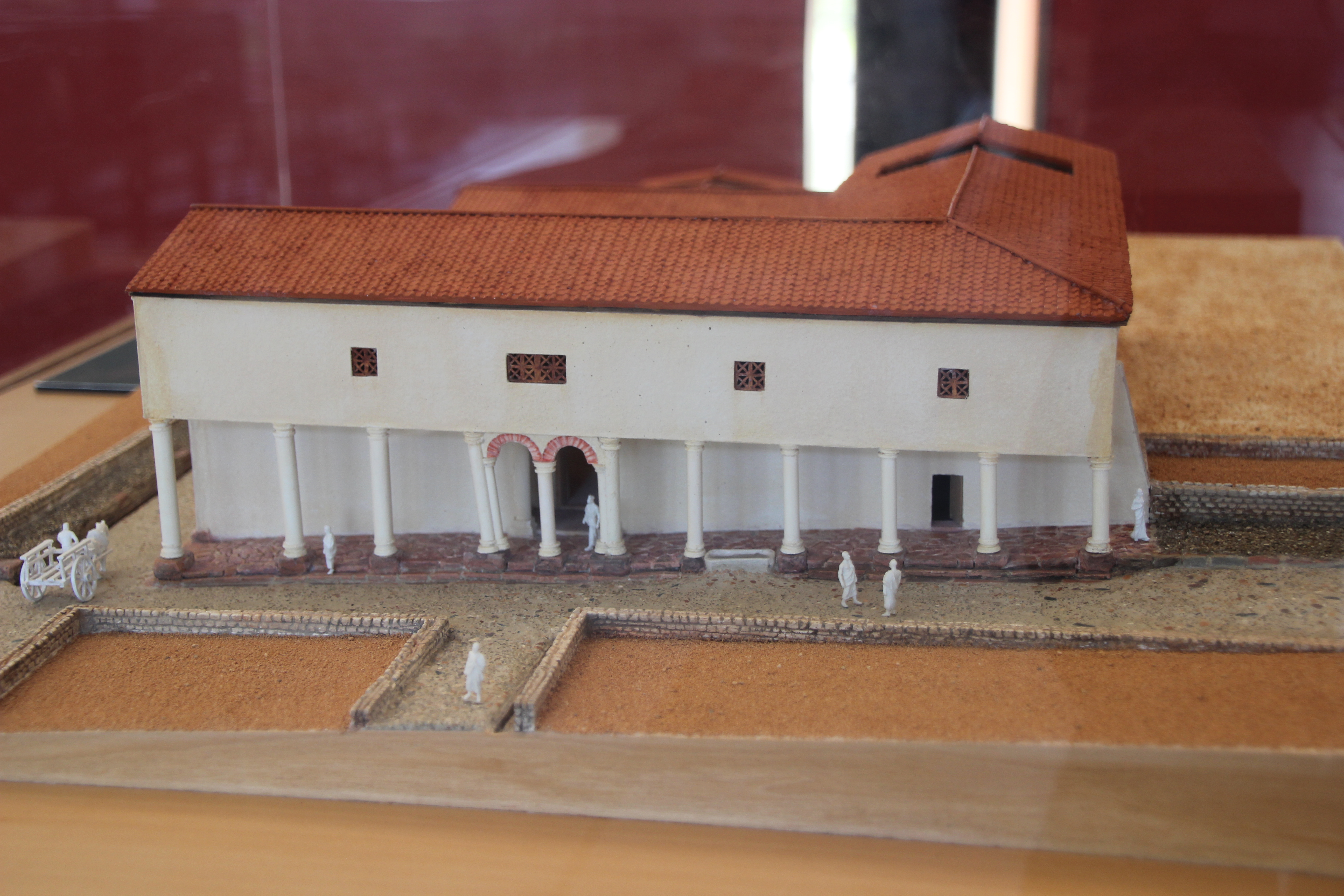 Vue septentrionale de la colonnade de la maquette de la maison au grand péristyle de Vieux-la-Romaine (Calvados, Normandie, France).